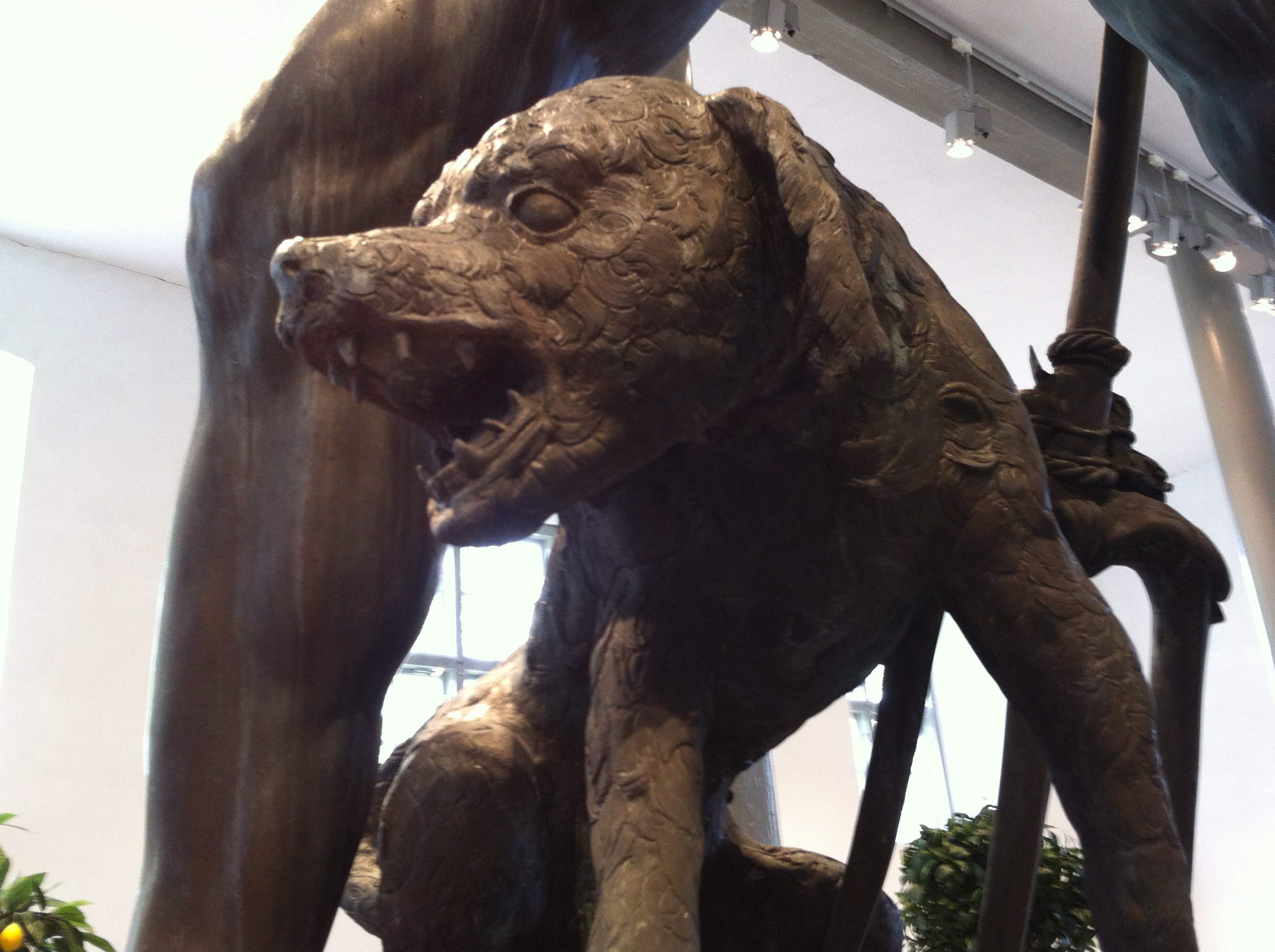 Hund tillhörande Herculesstaty, Museum de Vries